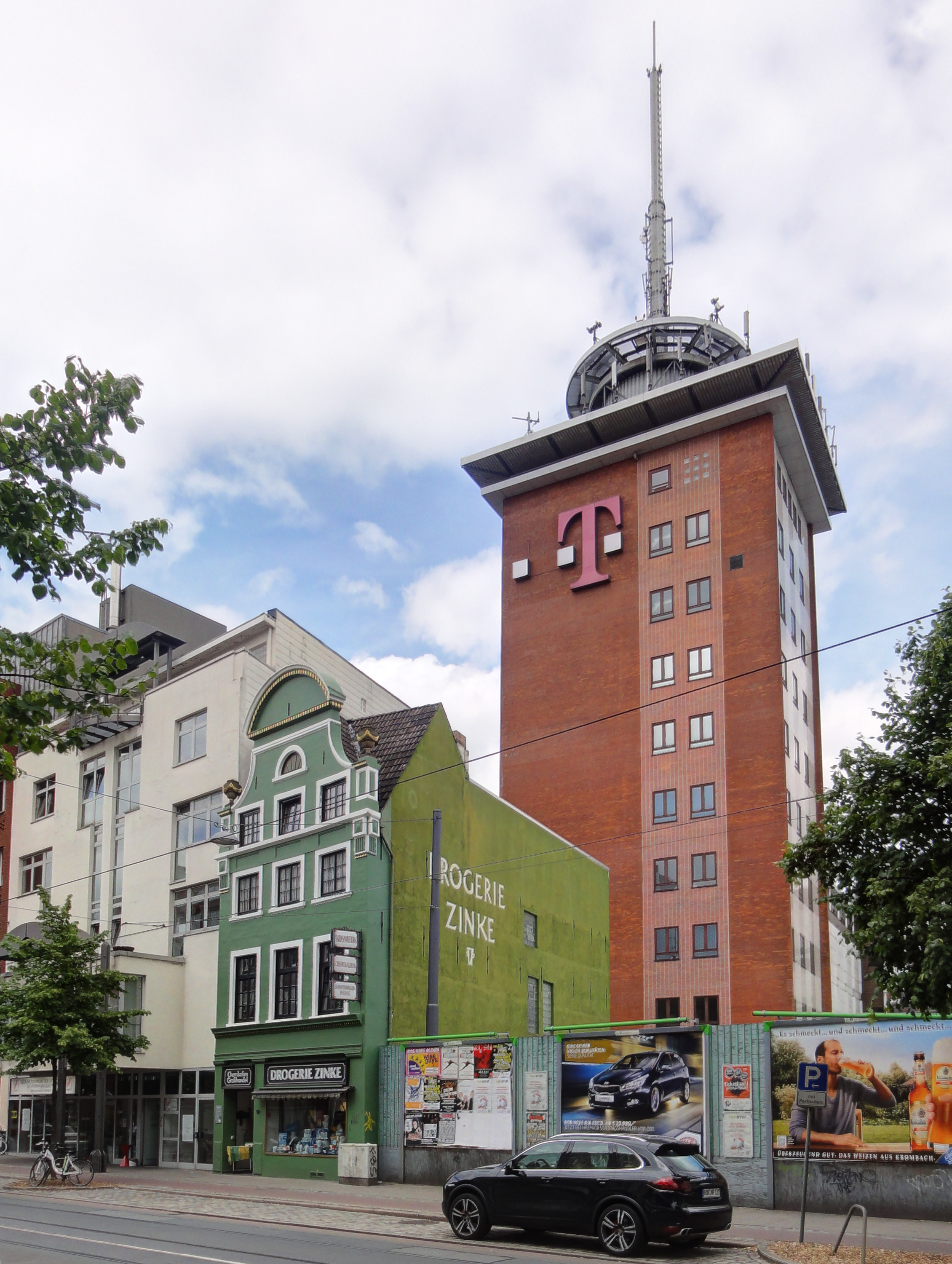 Drogerie Zinke in Bremen, Faulenstraße 17Das abgebildete Objekt ist ein geschütztes Kulturdenkmal in der Freien Hansestadt Bremen, mit der Nr. 0328 beim Landesamt für Denkmalpflege registriert.